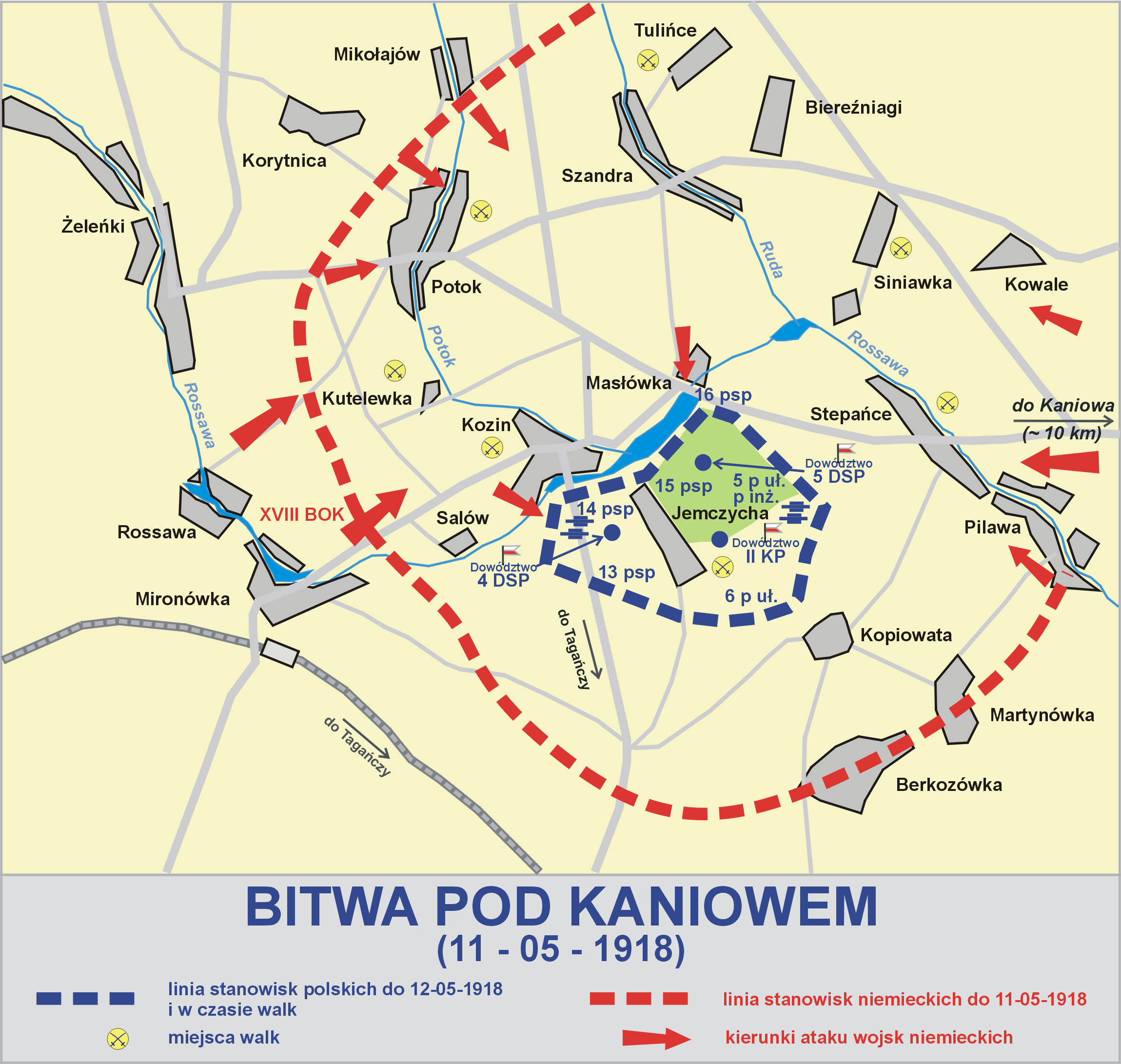 Bitwa pod Kaniowem (11-05-1918)